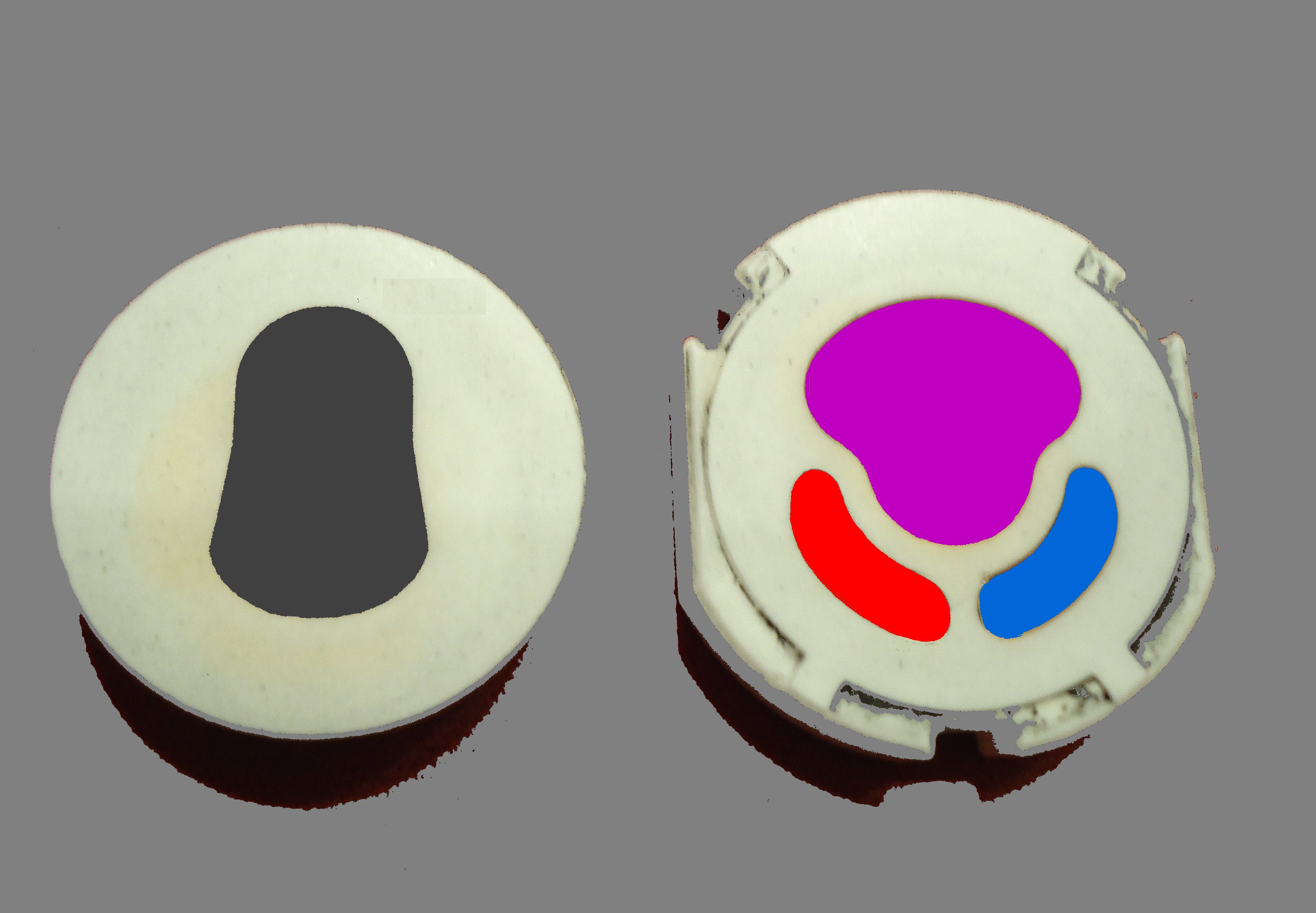 Grifo monomando. Configuración de los orificios en las caras de las placas cerámicas en contacto.